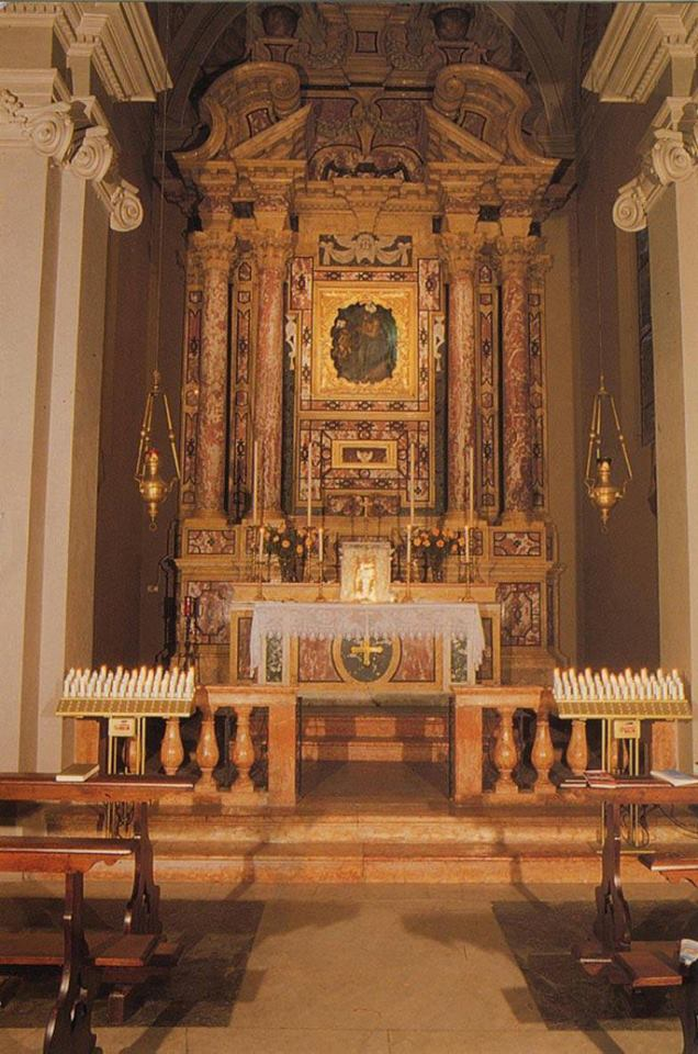 Cappella dei Caduti di tutte le guerre e della Madonna della Ghiara nella chiesa di San Francesco d'Assisi a Mirandola (1990)